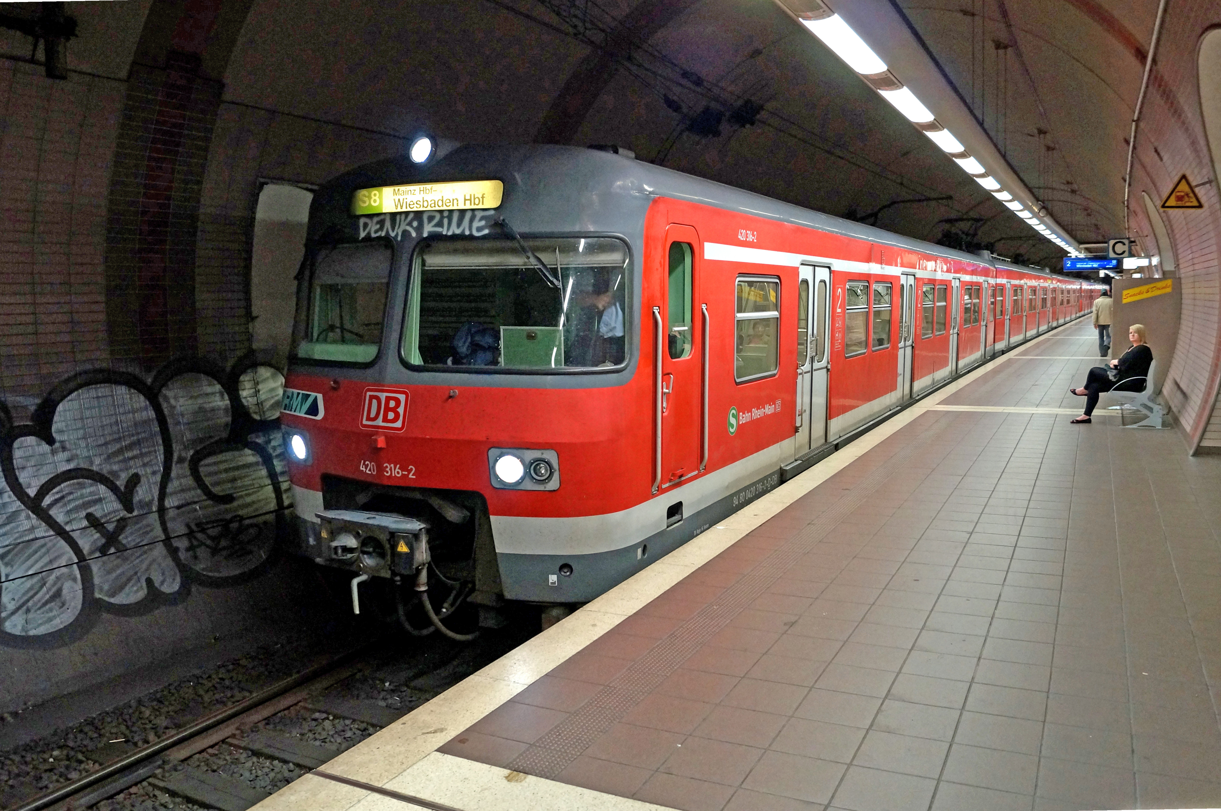 S8 der S-Bahn Rhein-Main mit Triebwagen der DB-Baureihe 420 im Bahnhof Frankfurt (Main) Ostendstraße